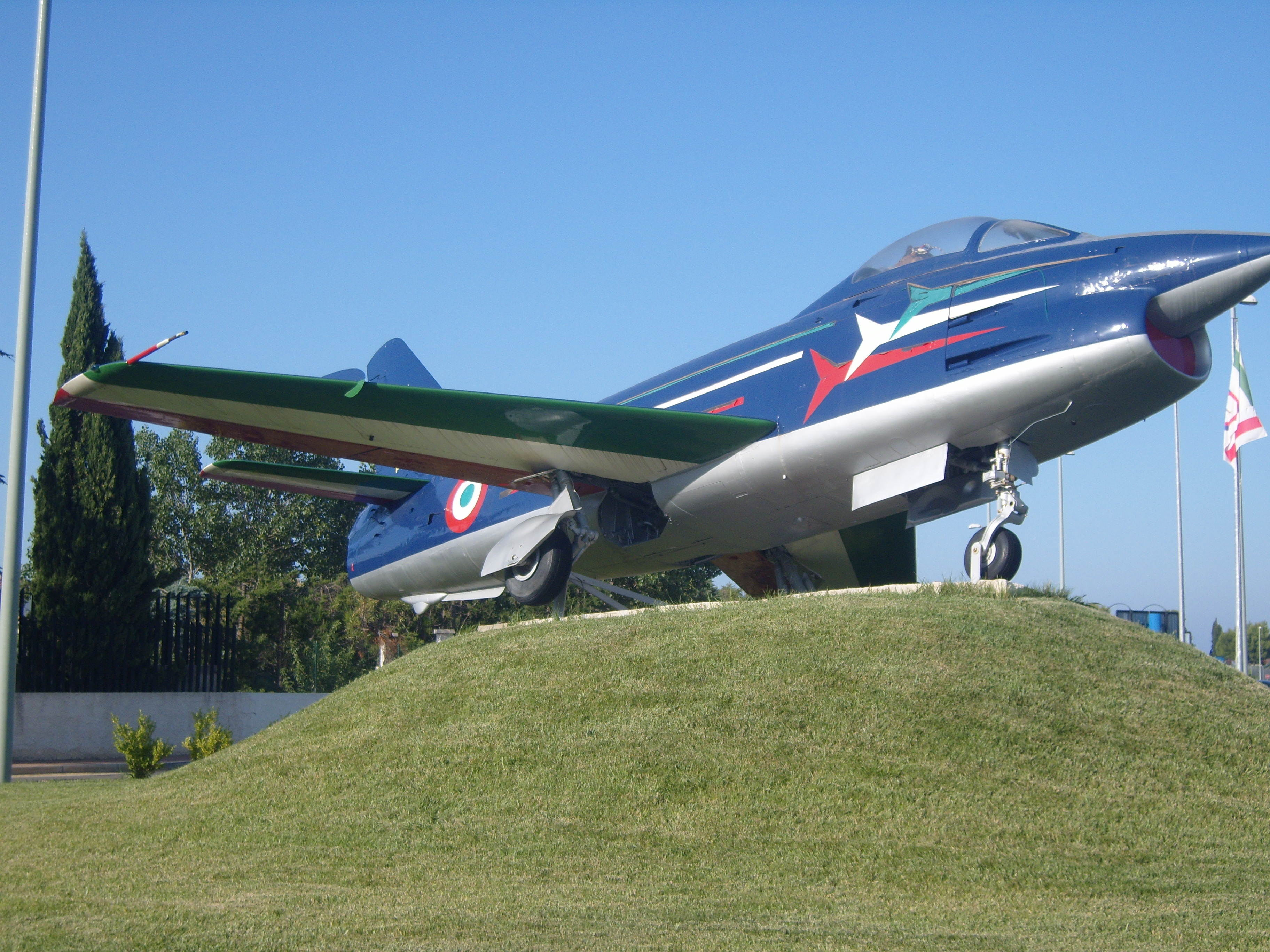 Reale velivolo delle Frecce Tricolori (restaurato, revisionato e riconfigurato dal maresciallo Giuseppe De Cristofaro nel 2006 - ) posto come gate guardian dell'Aeroporto di Brindisi (Aeroporto del Salento) Real airplane of the Frecce Tricolori (restored, revised and reconfigured by maresciallo Giuseppe De Cristofaro in 2006) put as gate guardian at Brindisi Airport (Salento Airport), Italy